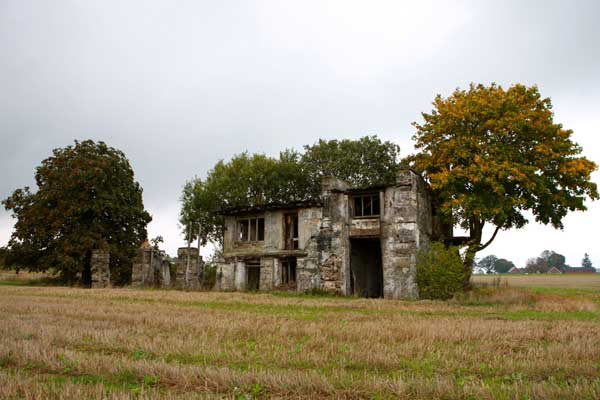 Byggnaden sedd från åkern.